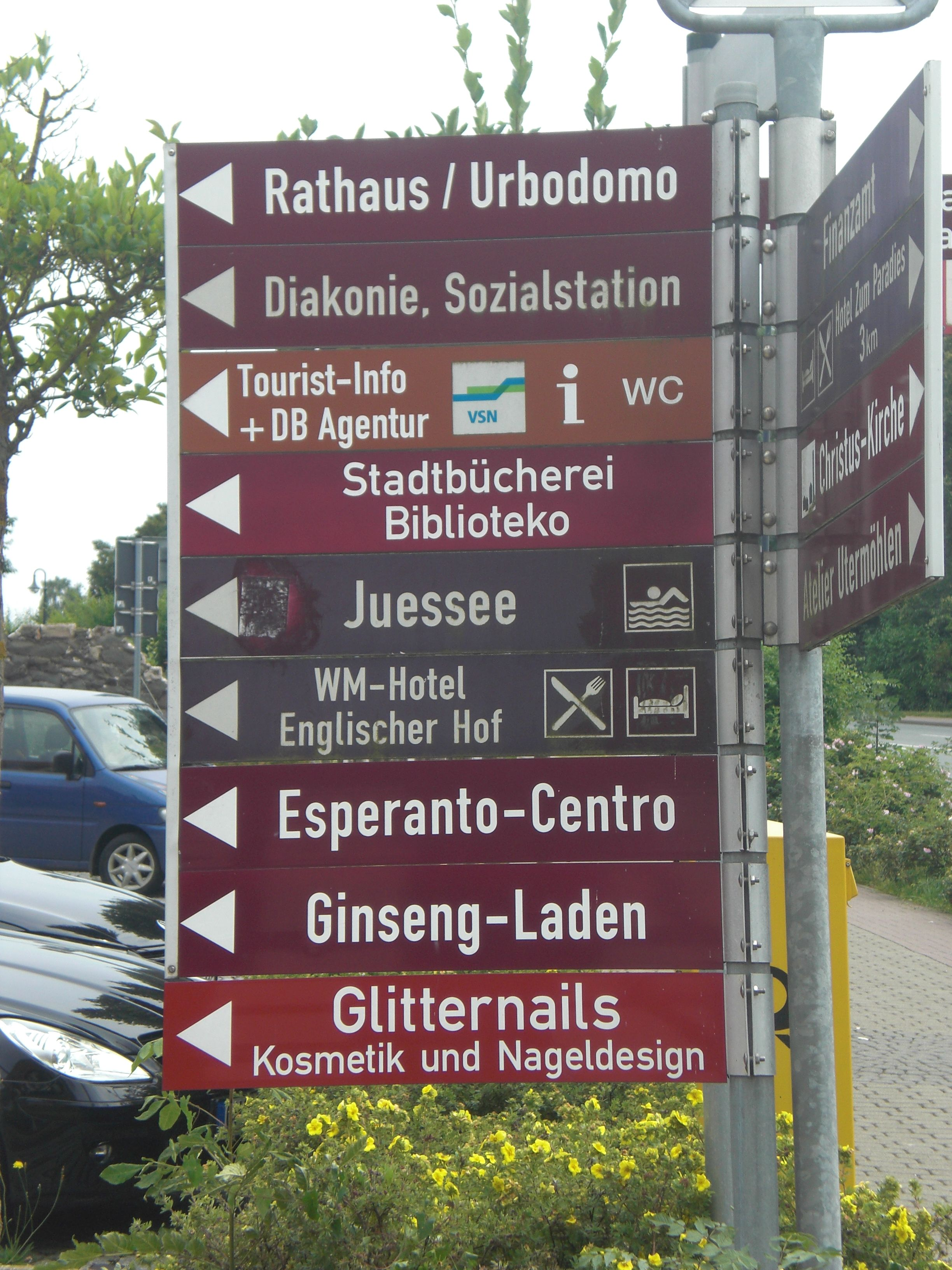 Dulingvaj sxildoj en Hercbergo